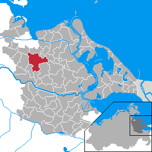 Groß Kiesow, Landkreis Ostvorpommern, Mecklenburg-Vorpommern